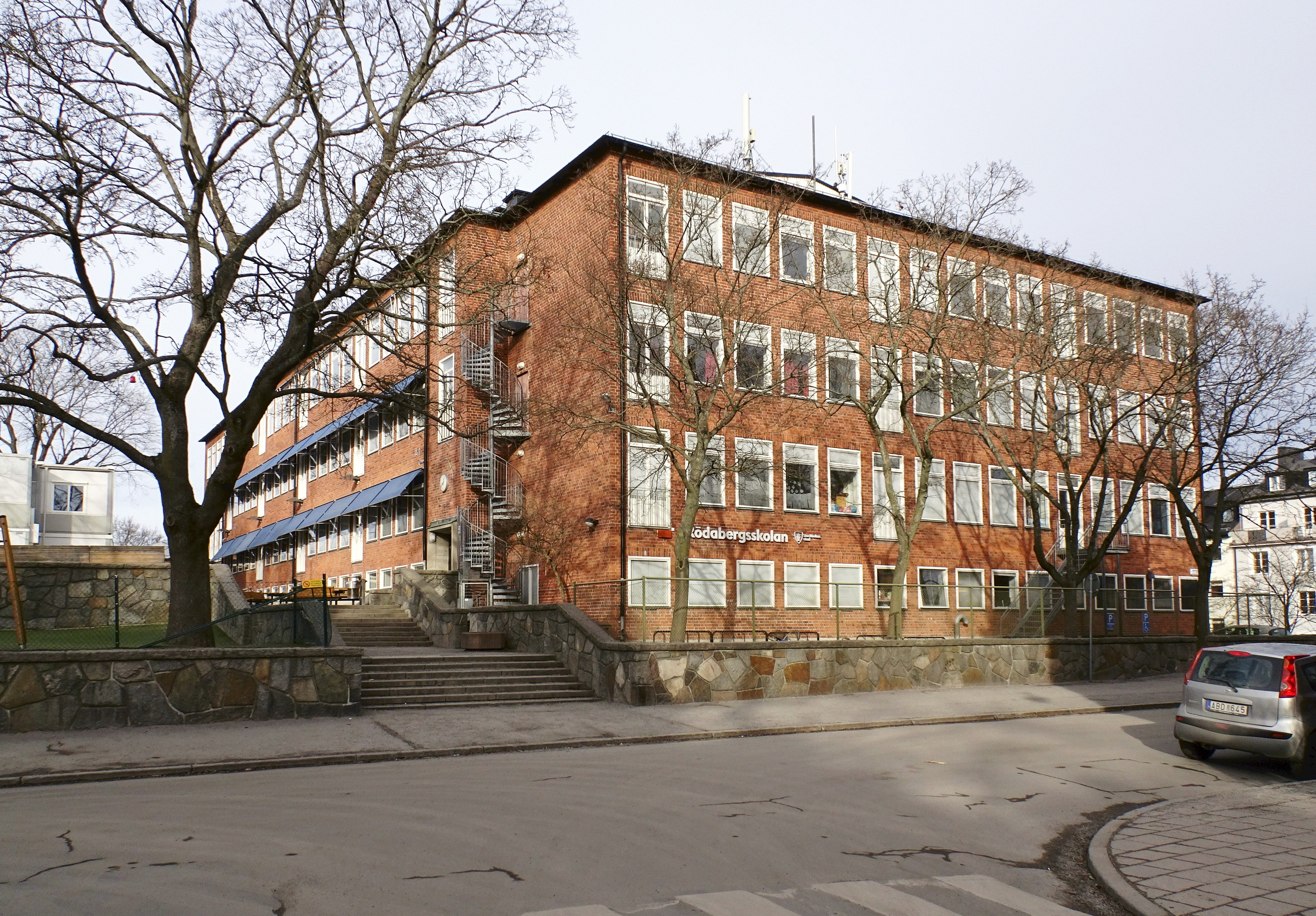 Rödabergsskolan